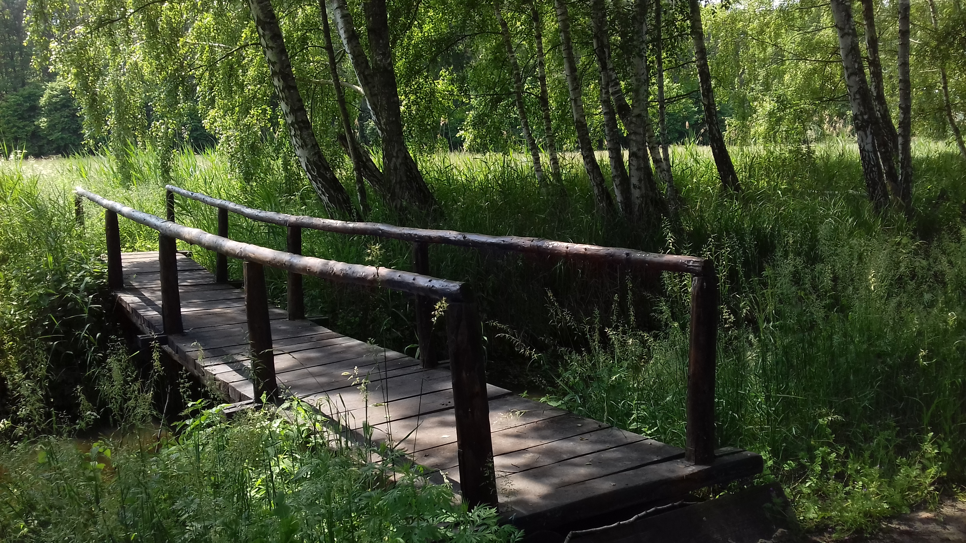 Mostek nad Trzebawką na turystycznym szlaku pieszym nr 3590 (czarnym) w rejonie ujścia strugi do Jeziora Dymaczewskiego